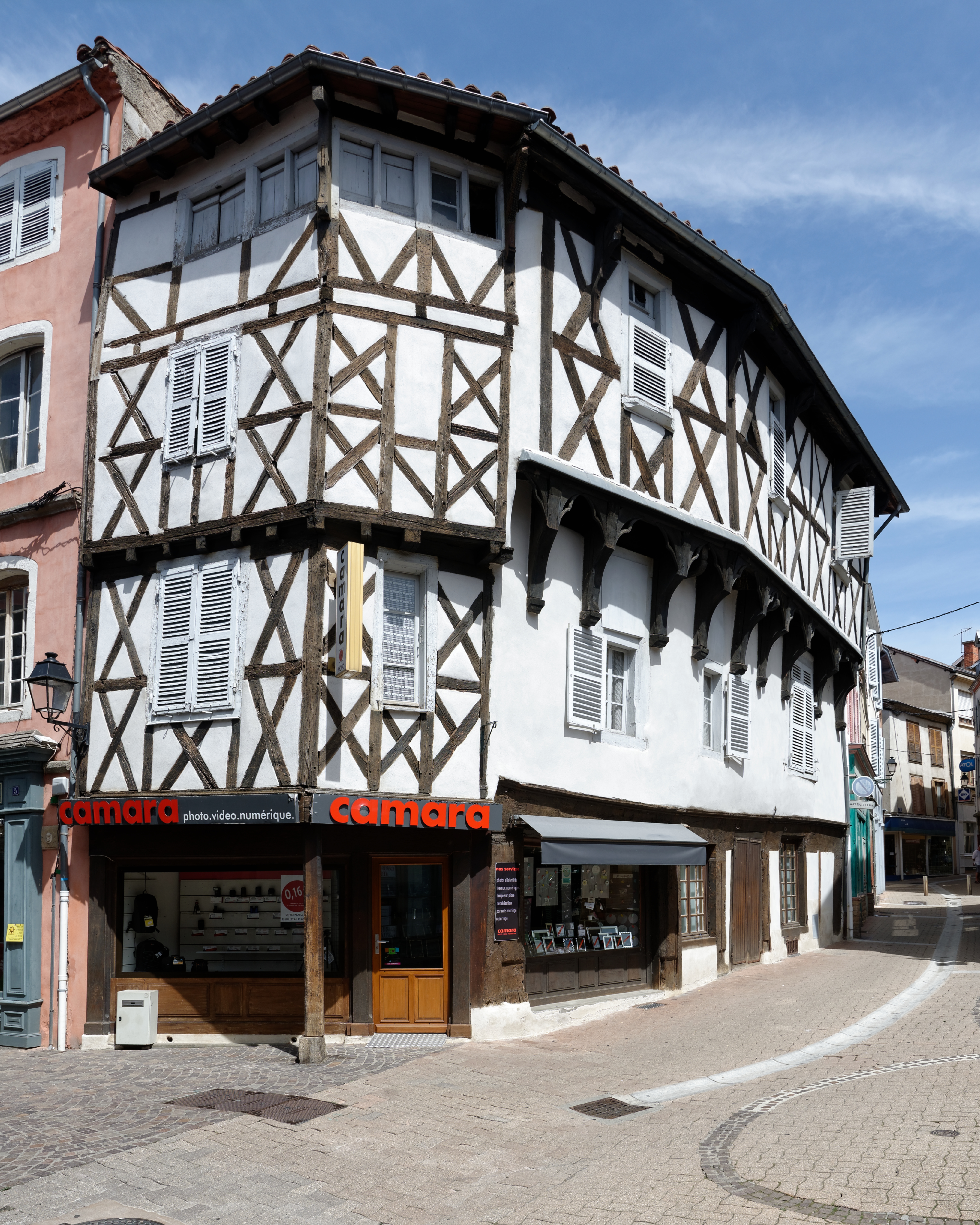 Maison du XVe siècle, place des Minimes à Ambert, Puy-de-Dôme.